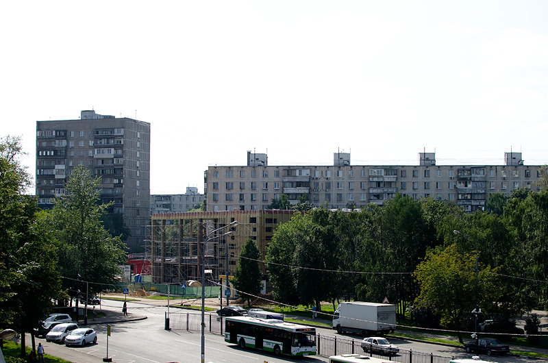 Проезд Анадырский, Москва Вид с платформы Лось.